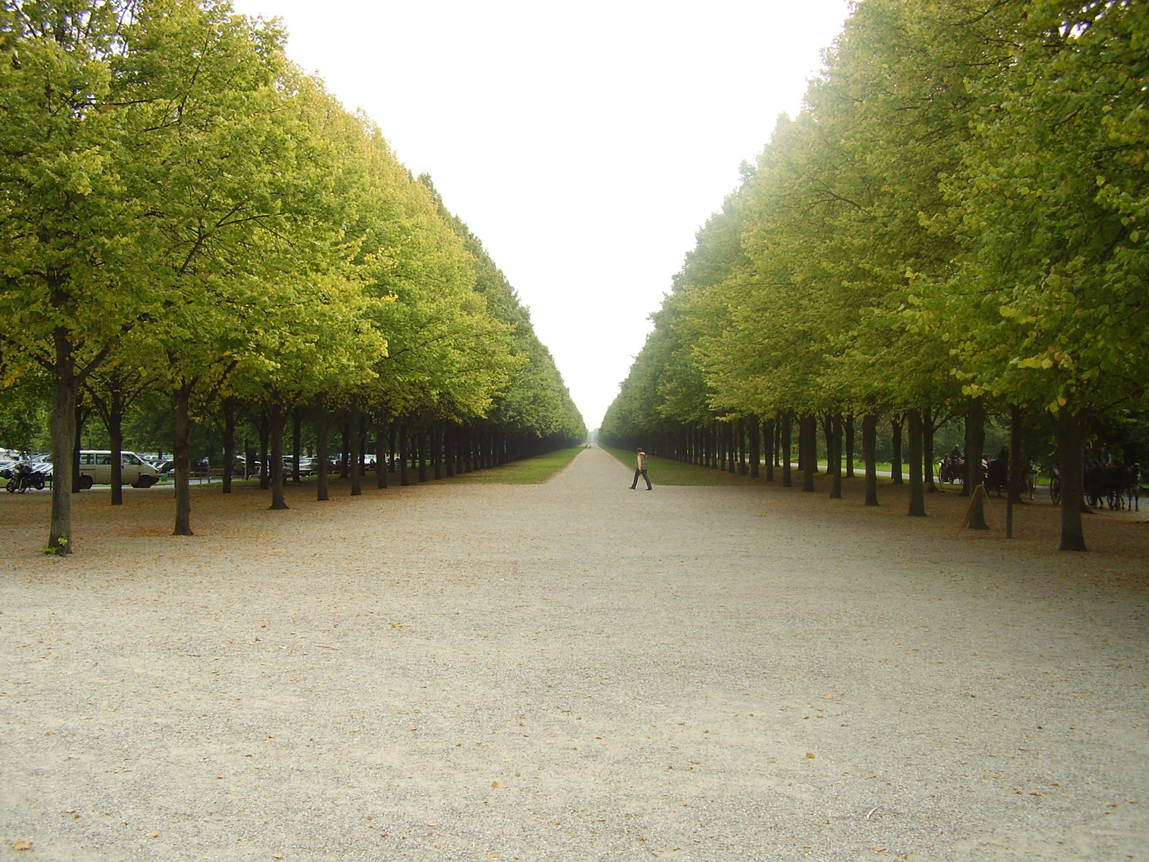 Herrenhäuser Gärten, Herrenhäuser Allee